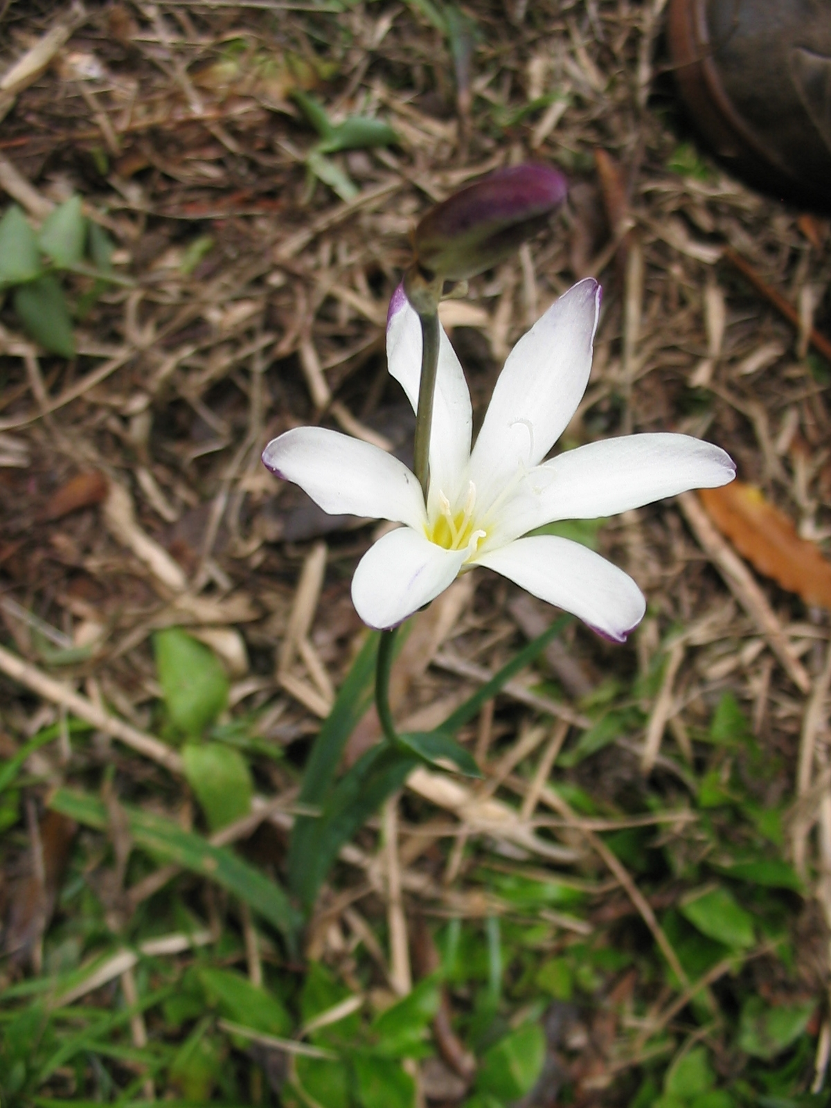 Sparaxis bulbifera - Habitus